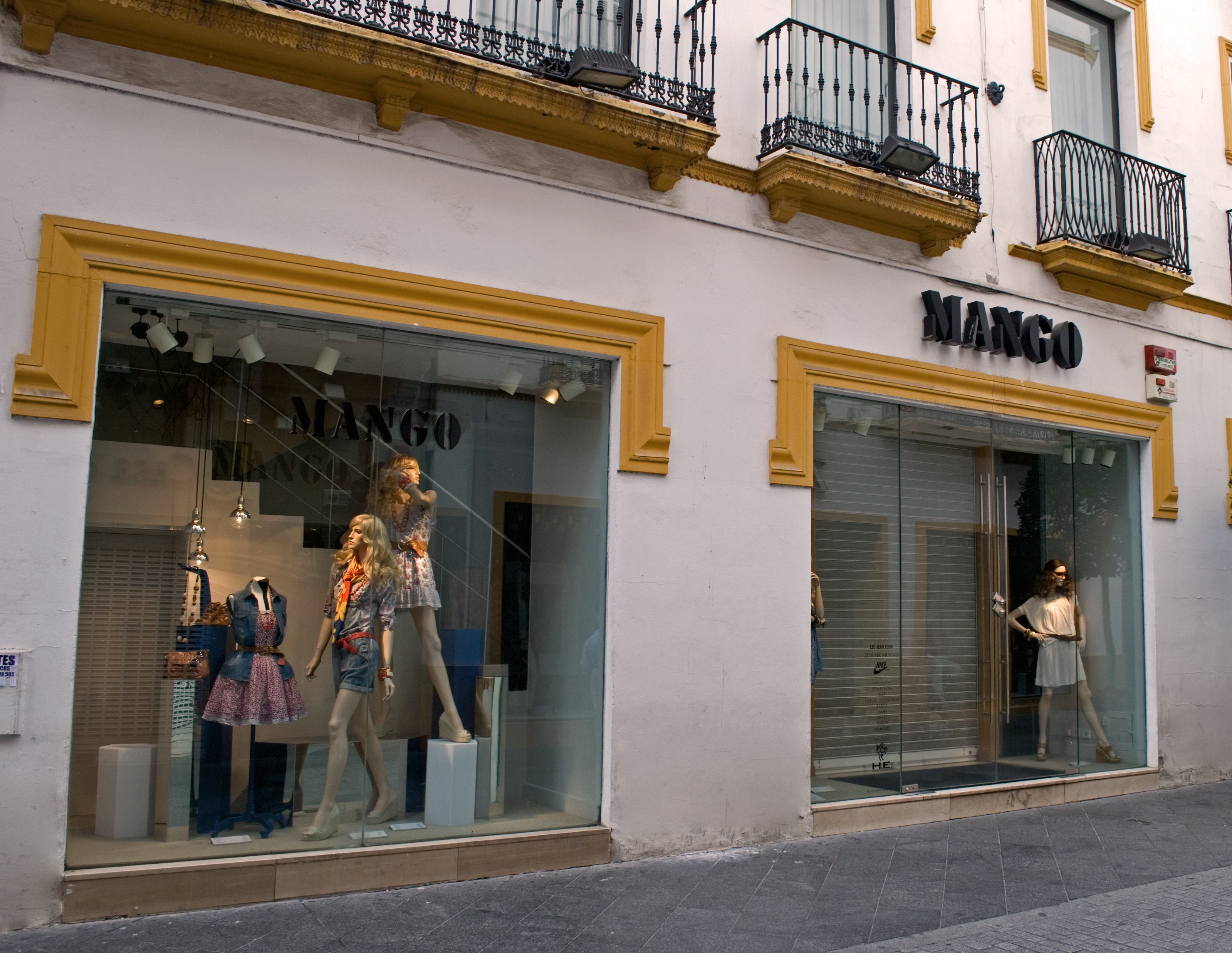 Tienda de la marca Mango en la calle Velázquez de Sevilla